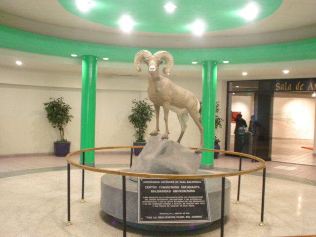 Mascota de UABC, Cimarron disecado